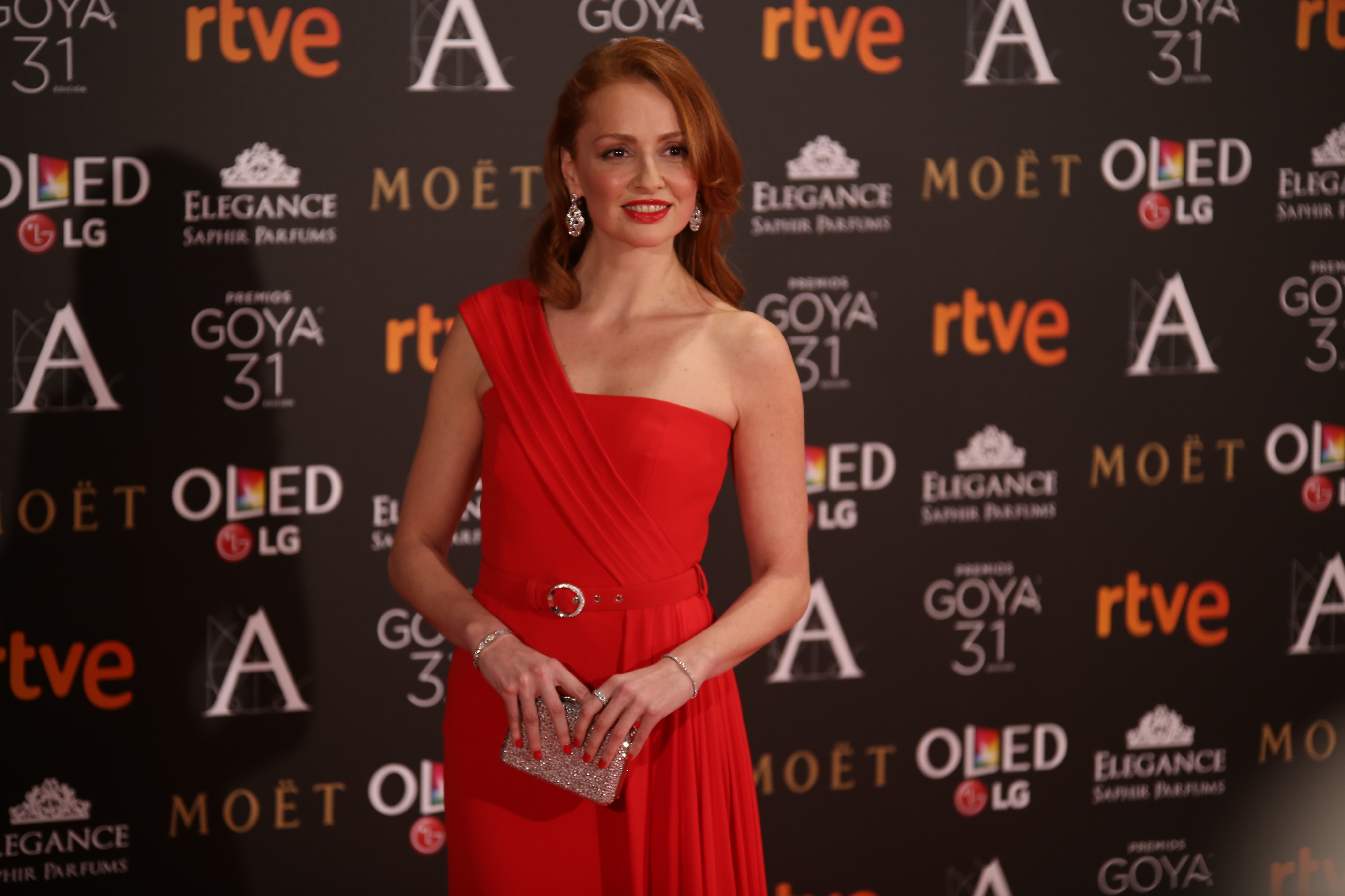 Premios Goya 2017